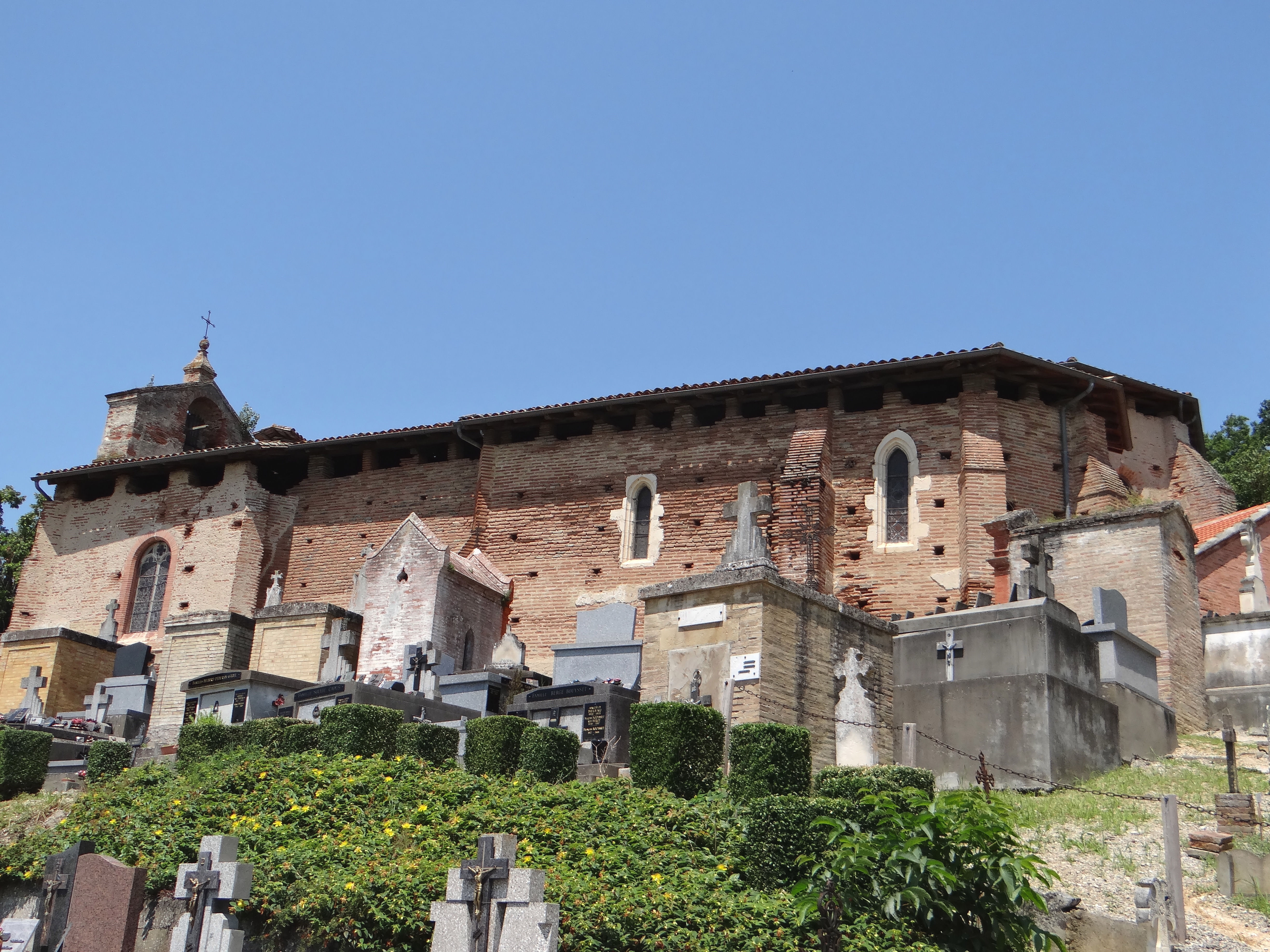 Piquecos - Église Saint-Félix vue du cimetière